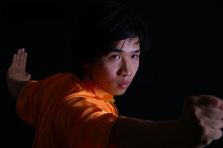 Jehmsei Keo, Schweizer Kampfsportler